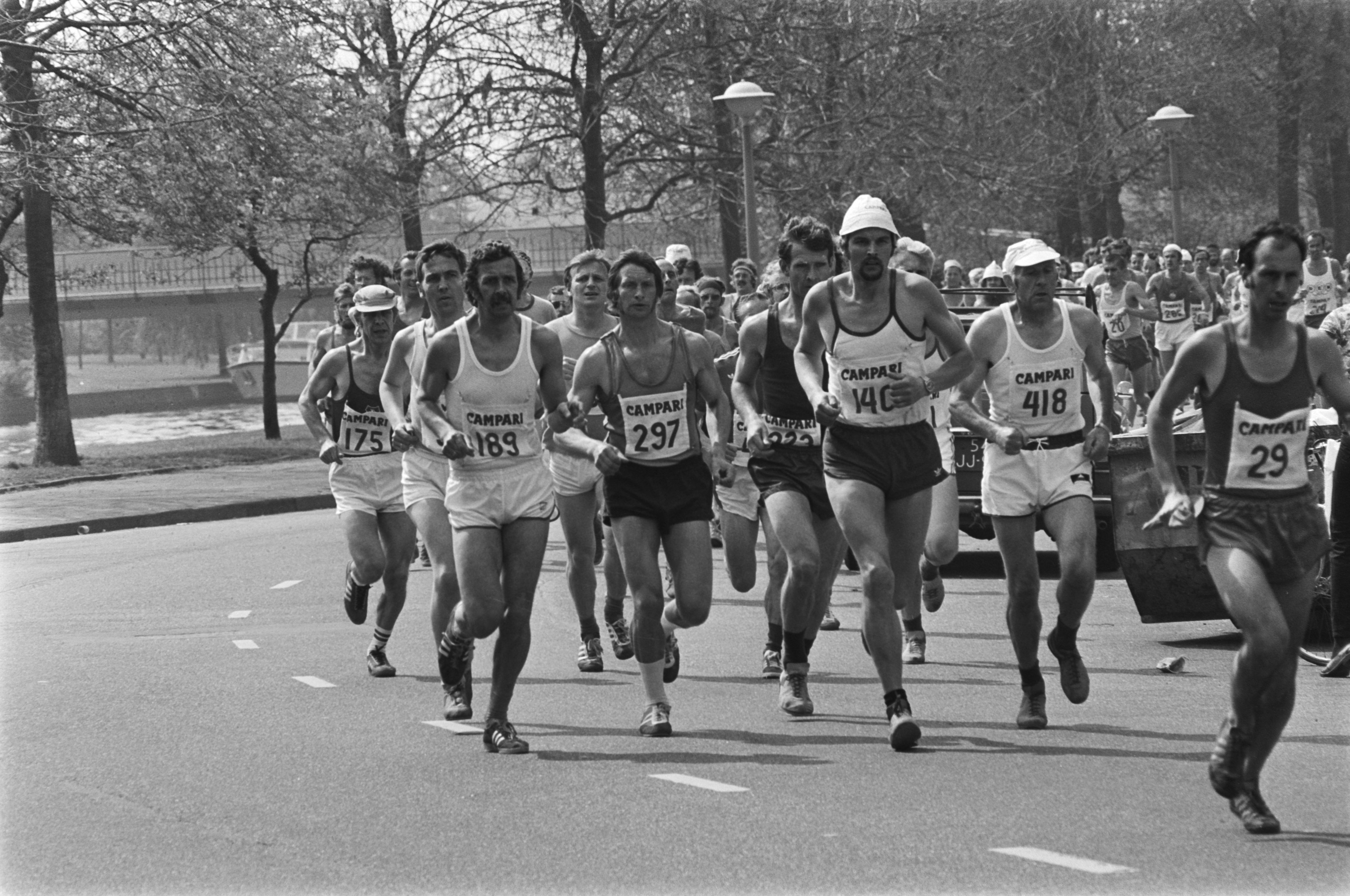 Lopers onderweg tijdens de marathon van Amsterdam in 1976